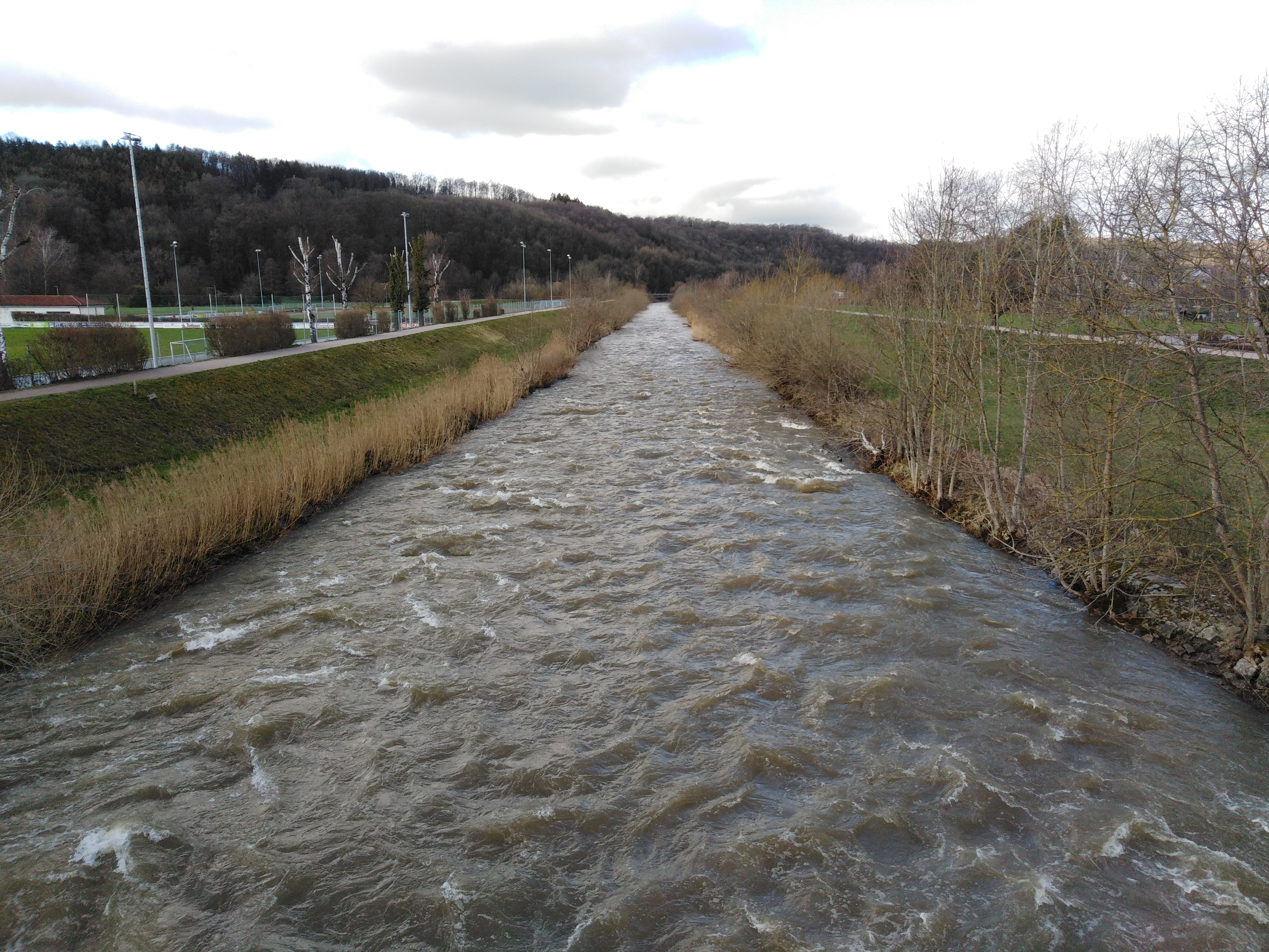 Lauchringen, Gemeinde im Landkreis Waldshut in Baden Württemberg. Regulierte Wutach bei Unterlauchringen.